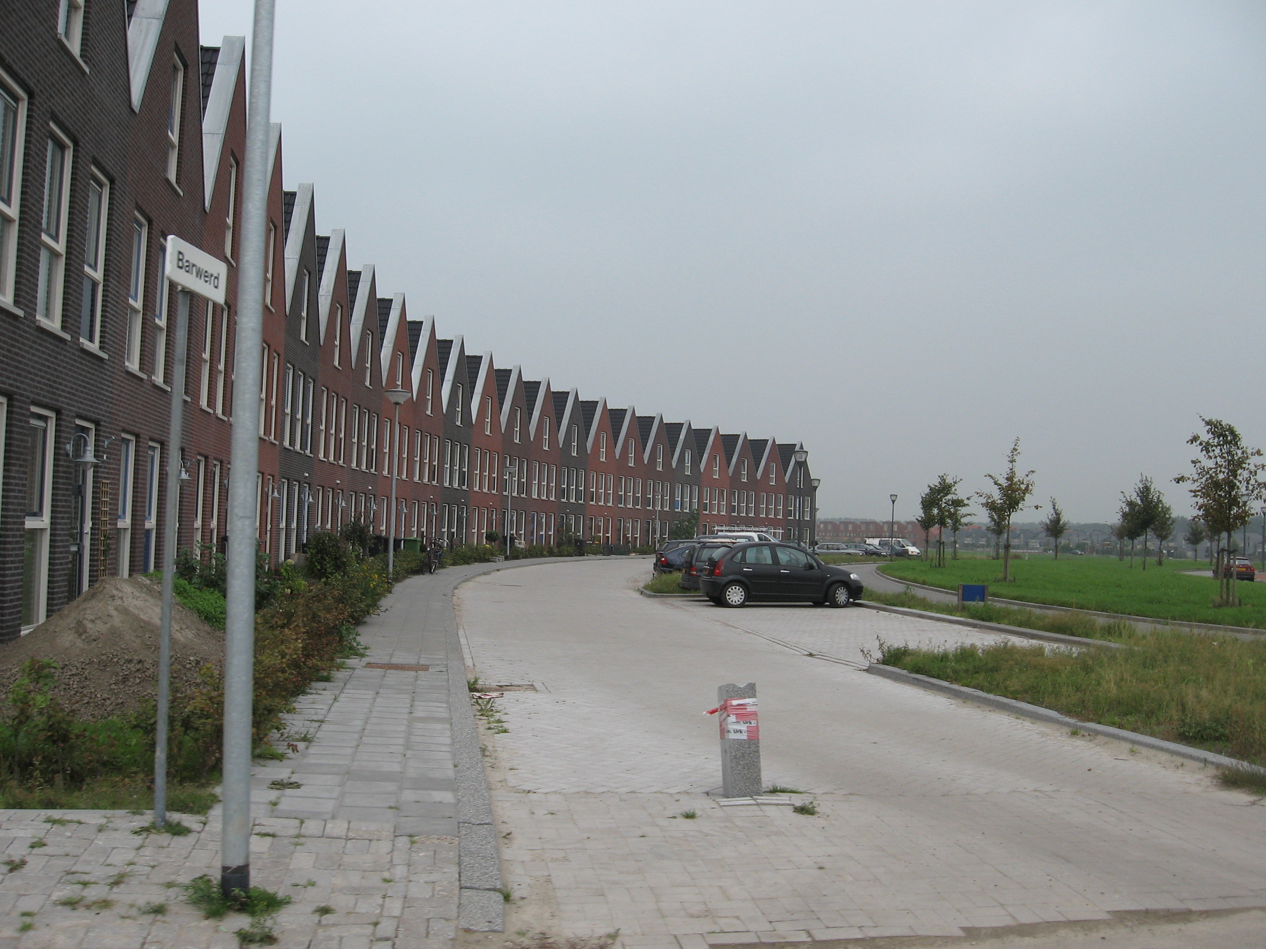 Description De Boog van Heemwerd in Groningen. Vrijgegeven onder GFDL. De Boog van Heemwerd in Groningen.